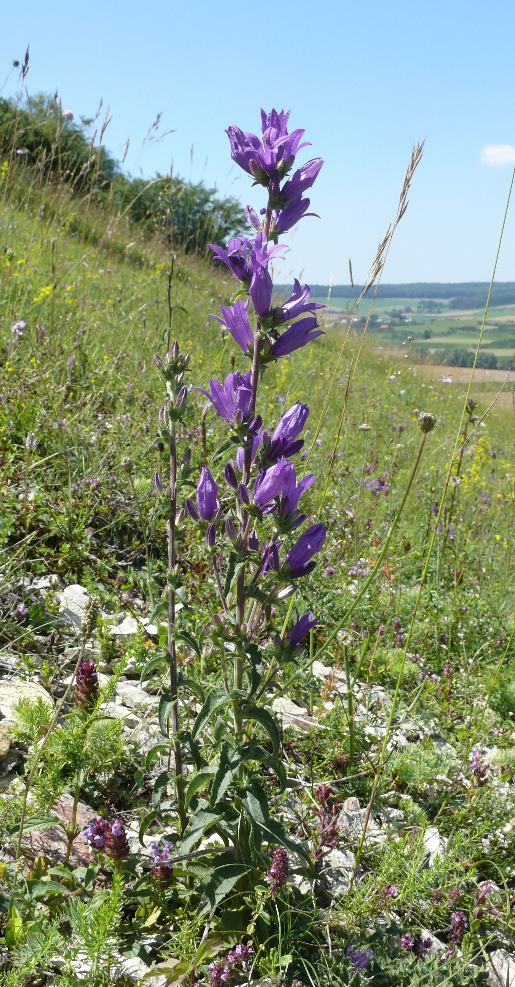 Campanula glomerata, Härtsfeld, Deutschland